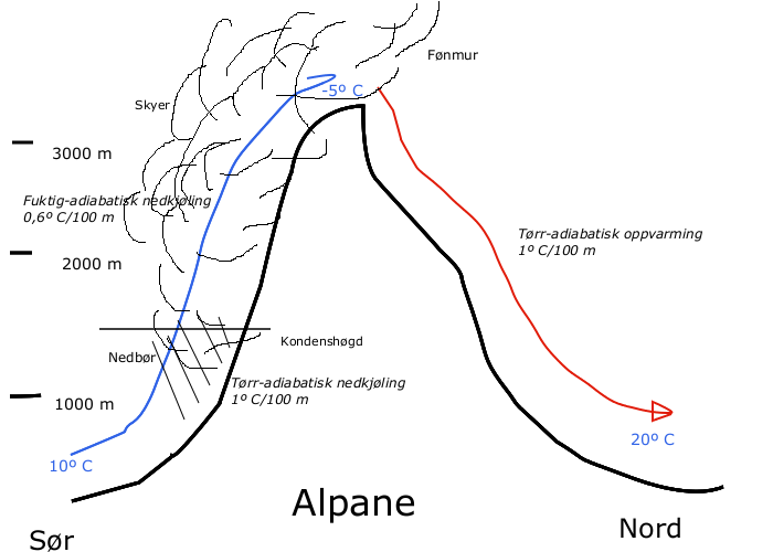 Prinsippskisse av føn-effekten. Ho er kopiert etter skisse frå tysk wikipedia. Teikna av Kjetil Lenes